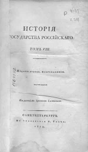 Istoria gossudarsrva Rossijkogo. Vydání 1819